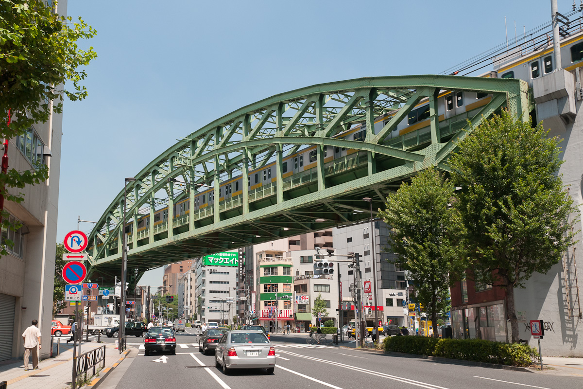 JR東日本総武線松住町架道橋。